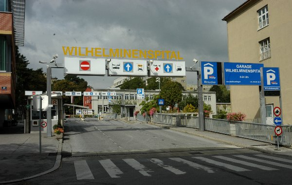 Haupteingang des Wilhelminenspitals in Wien-Ottakring